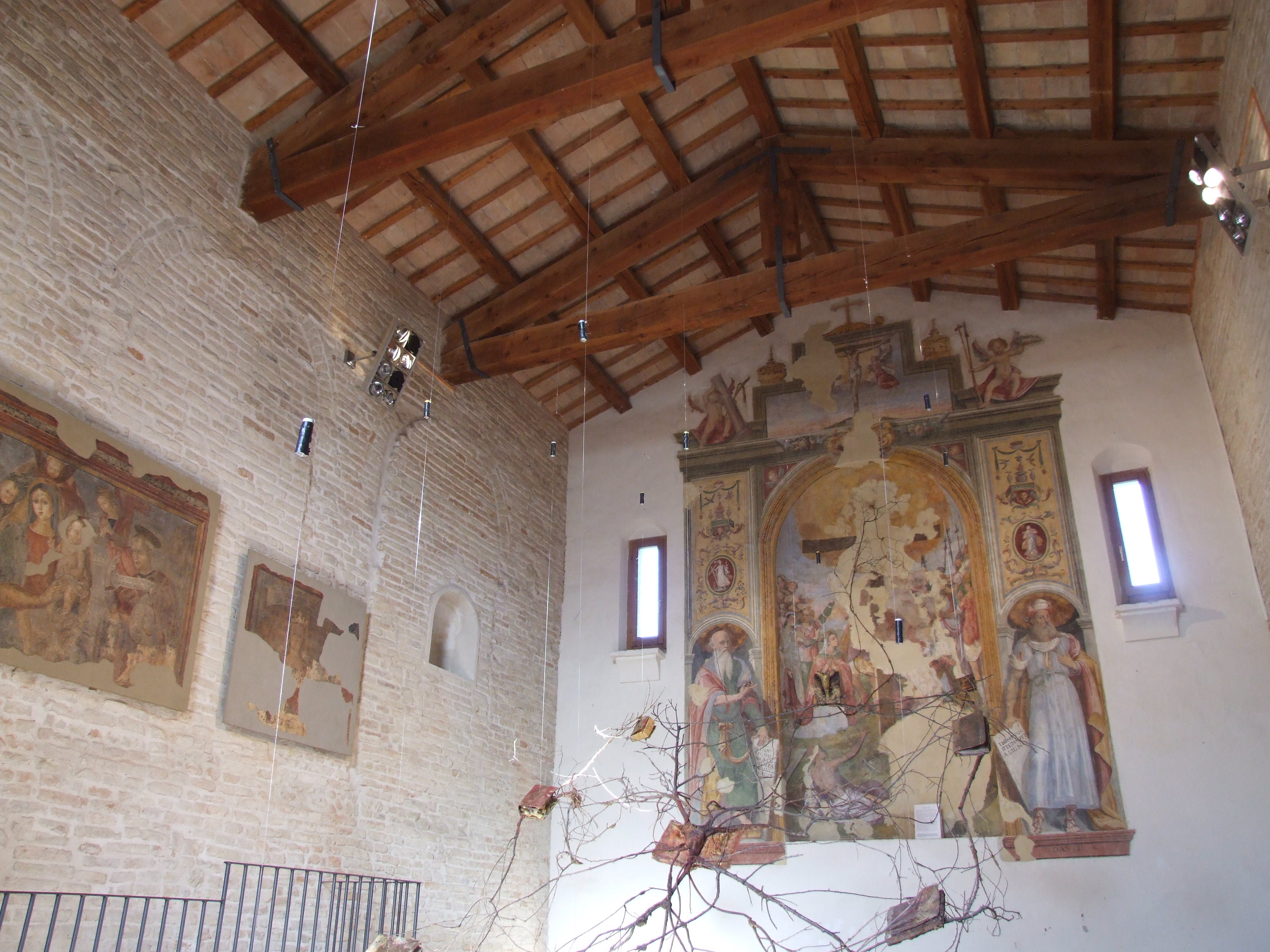 Chiesa di Santa Croce This is a photo of a monument which is part of cultural heritage of Italy.